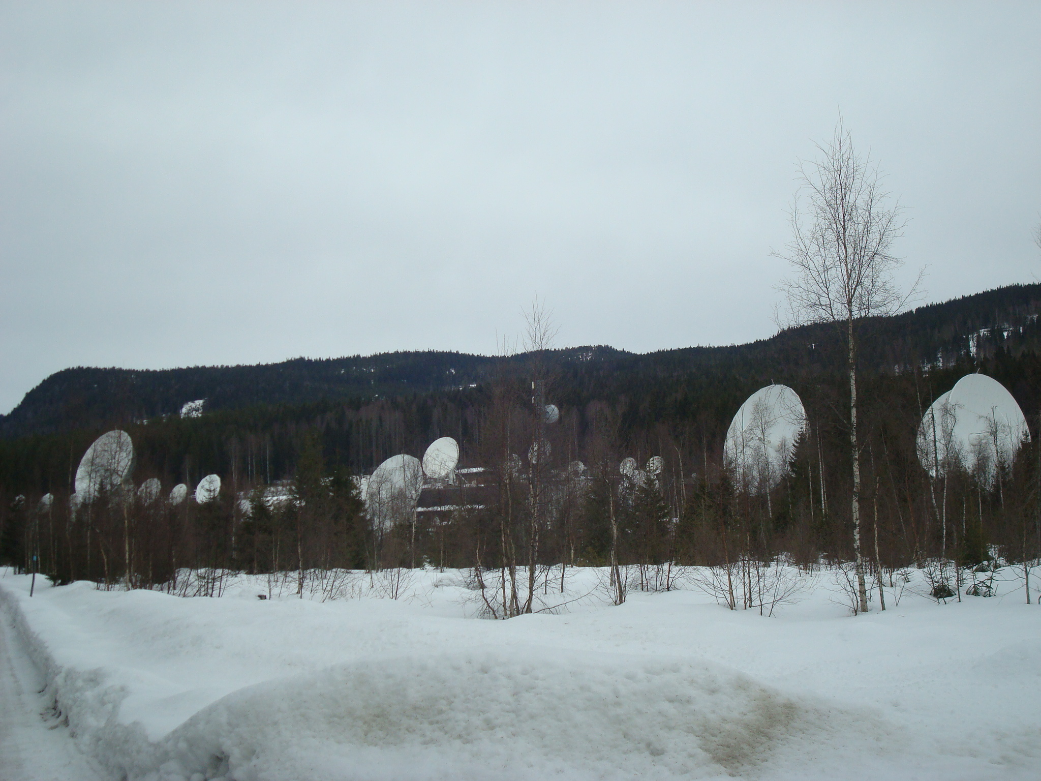 Nittedal jordstasjon